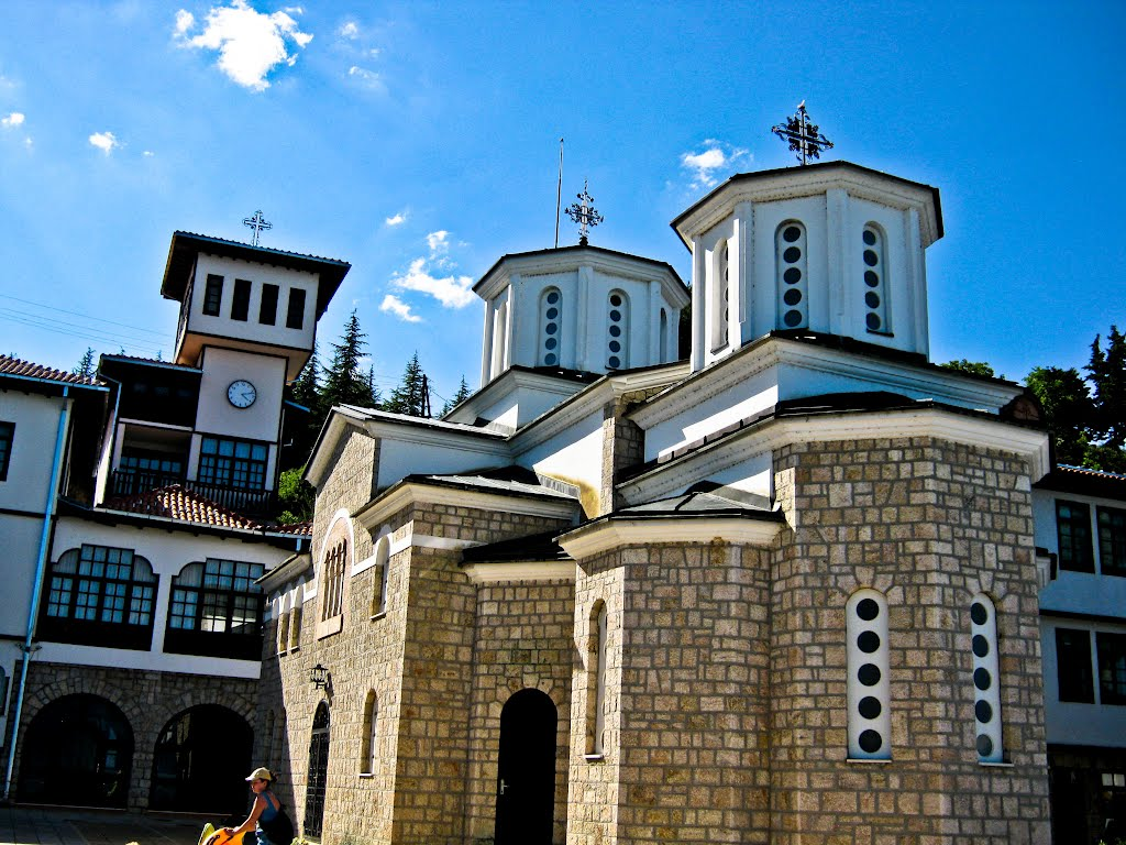 Манастирот „Успение на Пресвета Богородица“ во Калишта